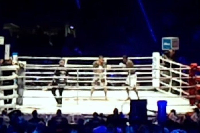 Konfrontacja Sztuk Walki 19: Michał Materla (po kewej) i Jay Silva, Łódź, Atlas Arena.